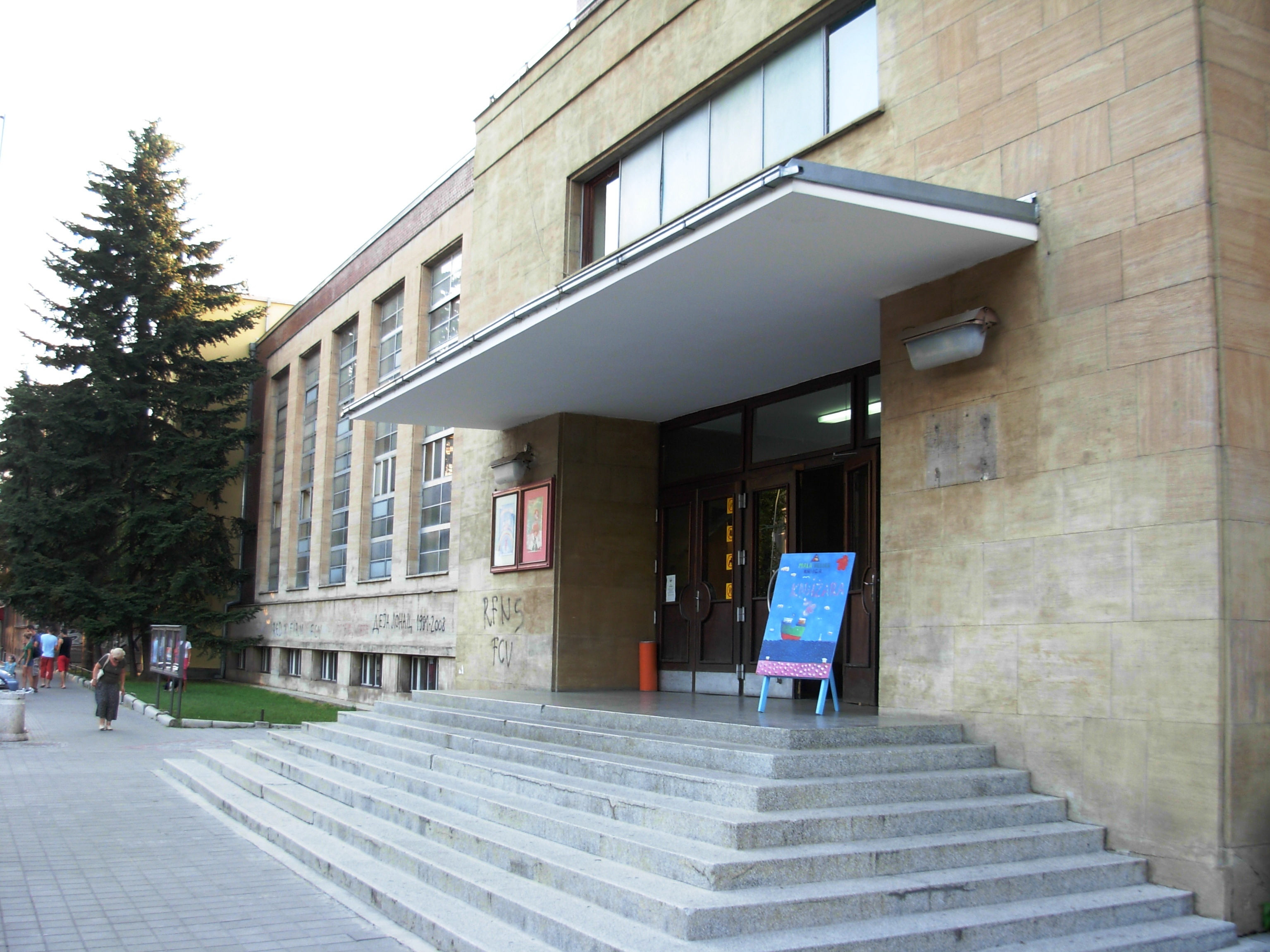 Pozorište mladih u Novom Sadu.